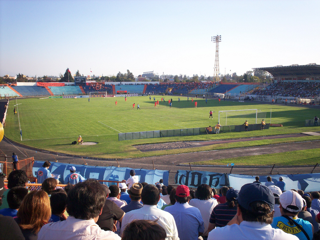 Estadio El Teniente, Rancagua, durante un partido de O'Higgins con Cobreloa.